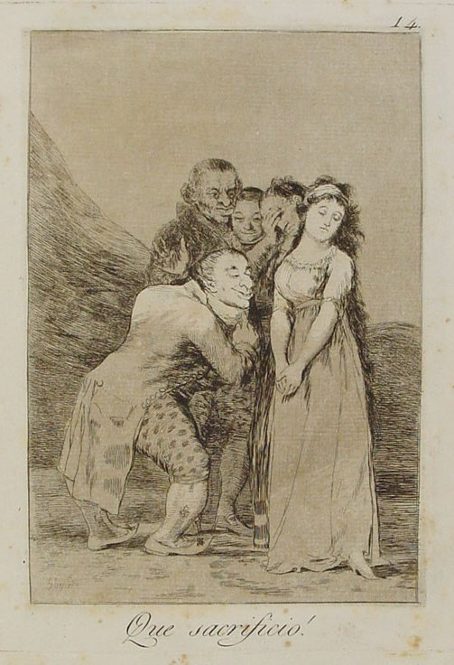 Capricho nº 14: ¡Qué sacrificio! de Goya, serie Los Caprichos